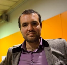 Guillem Anglada Escudé és un astrònom català que realitza recerca en el camp dels exoplanetes.